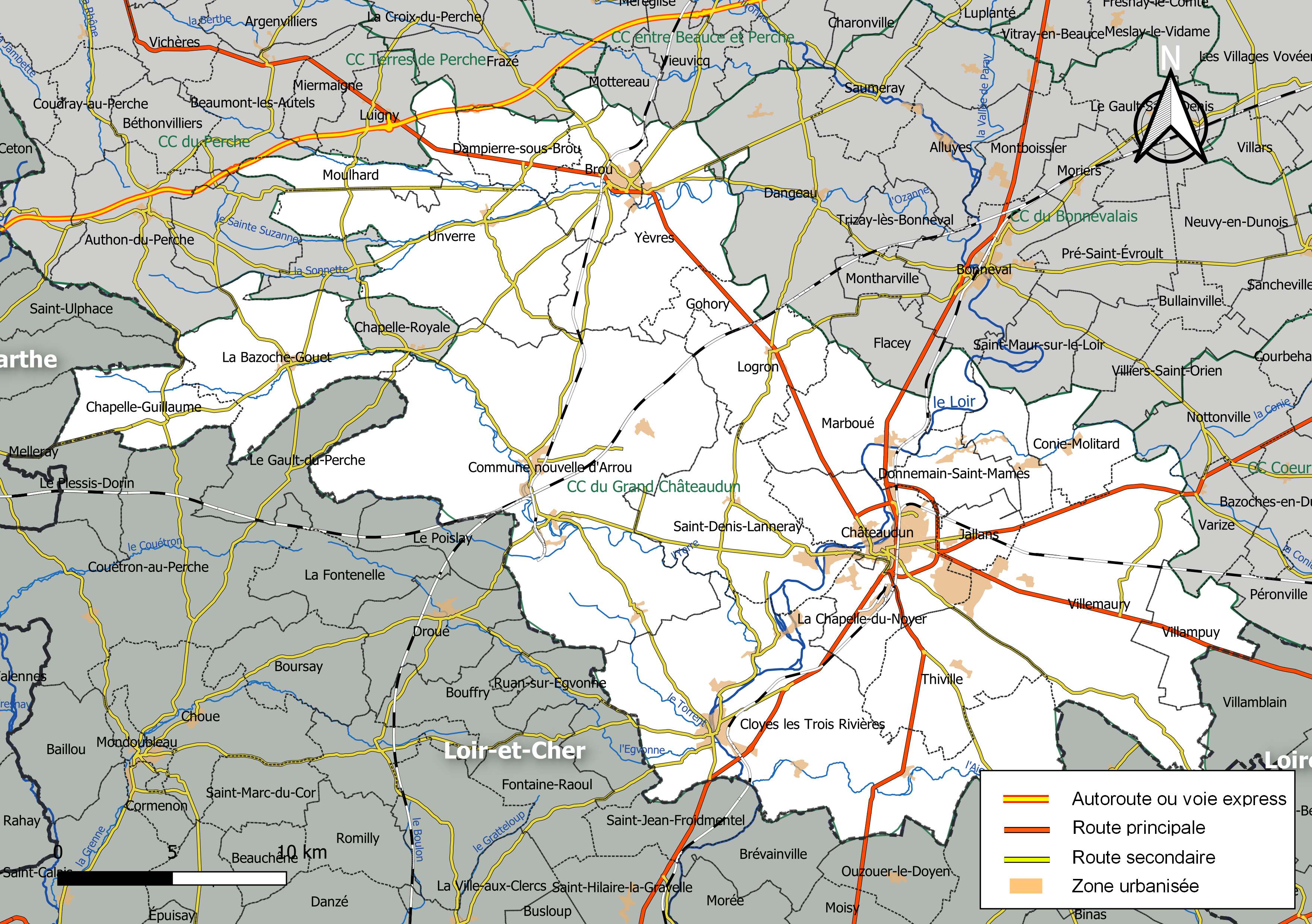 Carte géographique de la communauté de communes du Grand Châteaudun, département d'Eure-et-Loir, France. Composition au 1er janvier 2019.